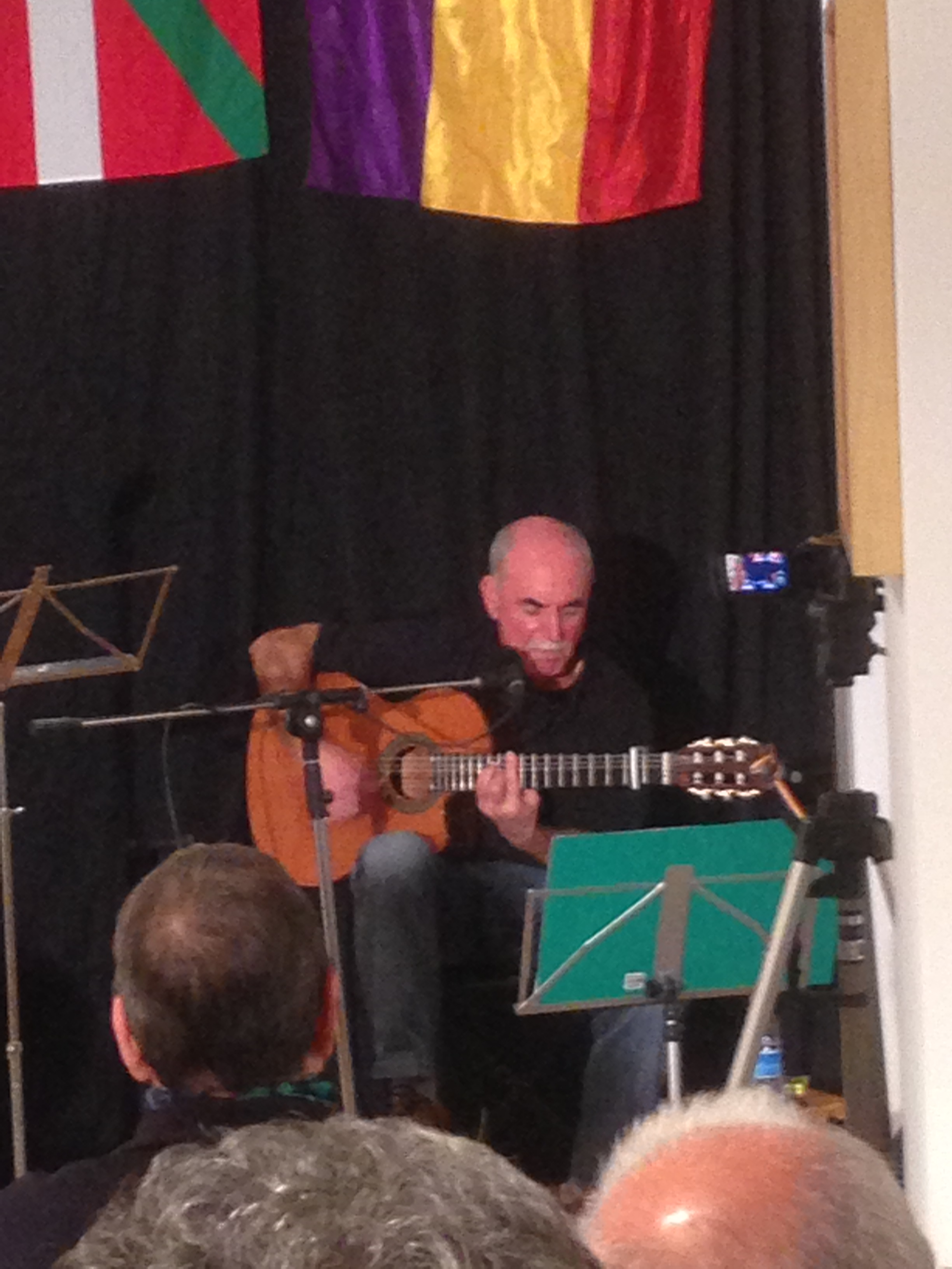 Paco Marín en el Homenaje a las mujeres en la II República Española realizado en Eibar el 17 de octubre de 2015.